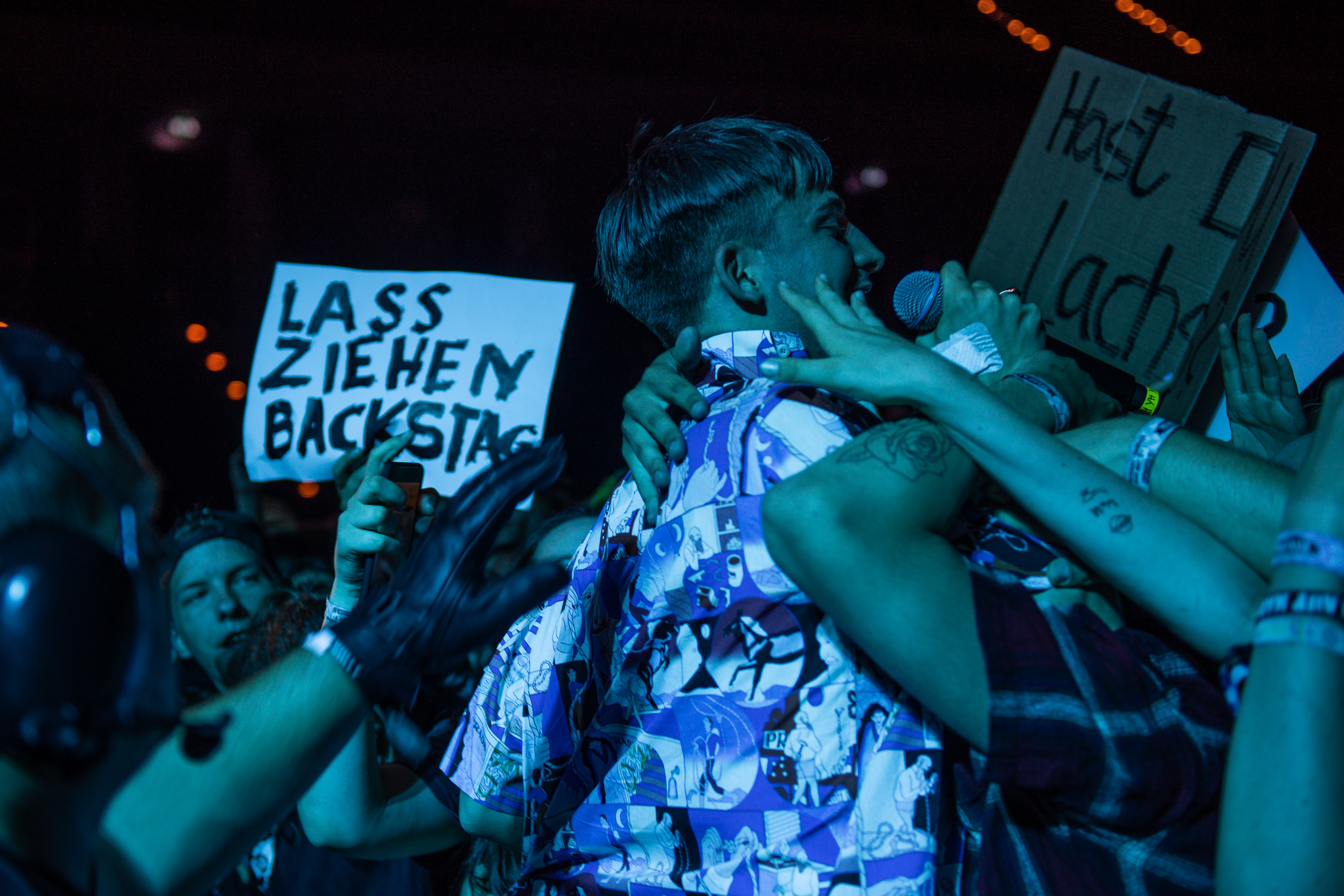 ARGO-Konzerte,Alternarena,Festival,Julian Sellmeister,Konzert,Livekonzert,Livemusik,Musik,RiP,Rock im Park 2018,Yung Hurn